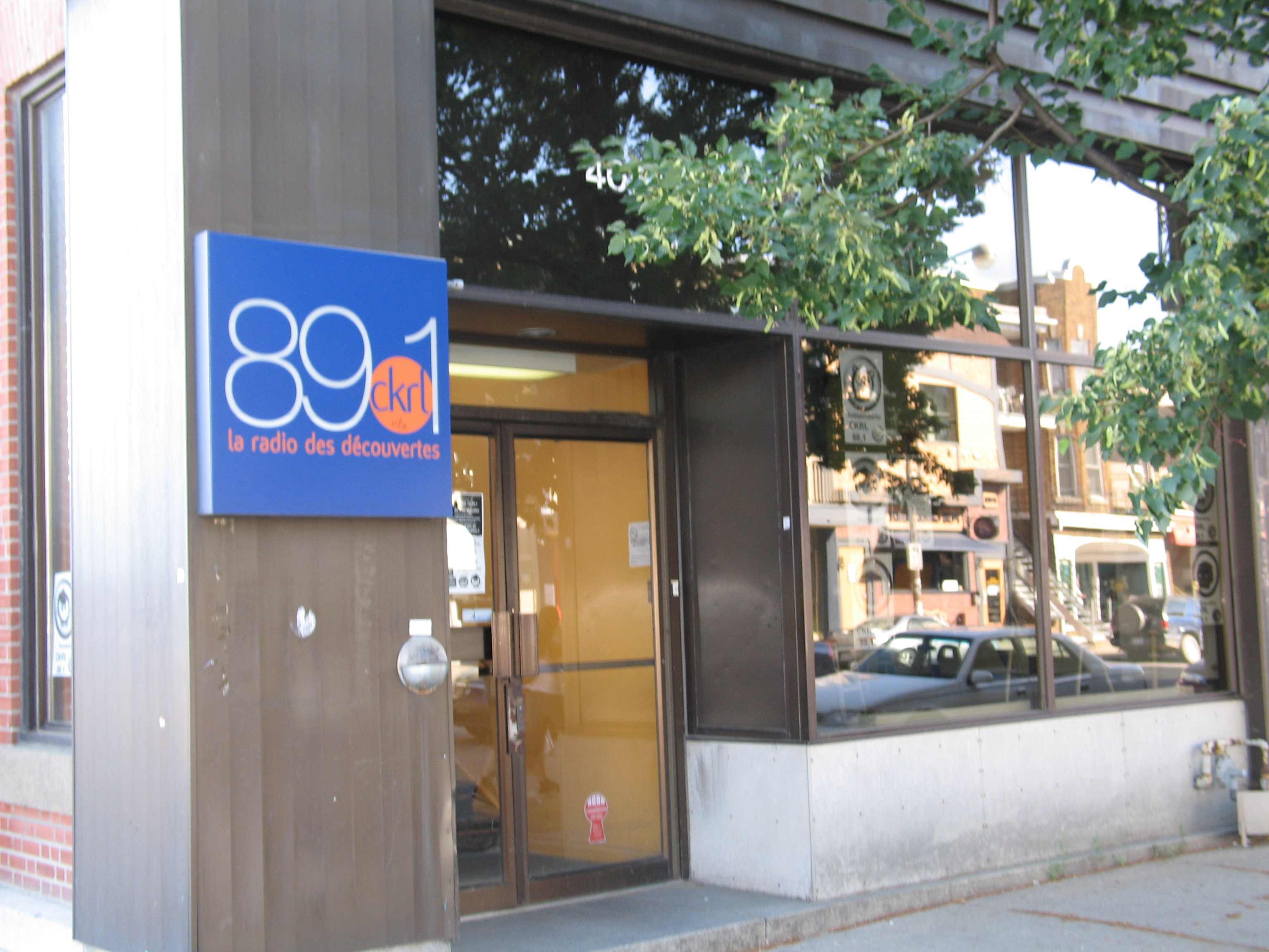 La radio CKRL 89.1 FM, diffuse de ses studios, situés au coin de la 3e avenue et de la 4e rue dans l'arrondissement Limoilou de Québec.